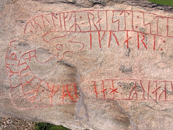 Sö107 Gredby Ingvar